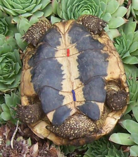 Testudo hermanni hermanni suture